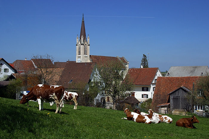 Kilchberg im Kanton Basel-Landschaft